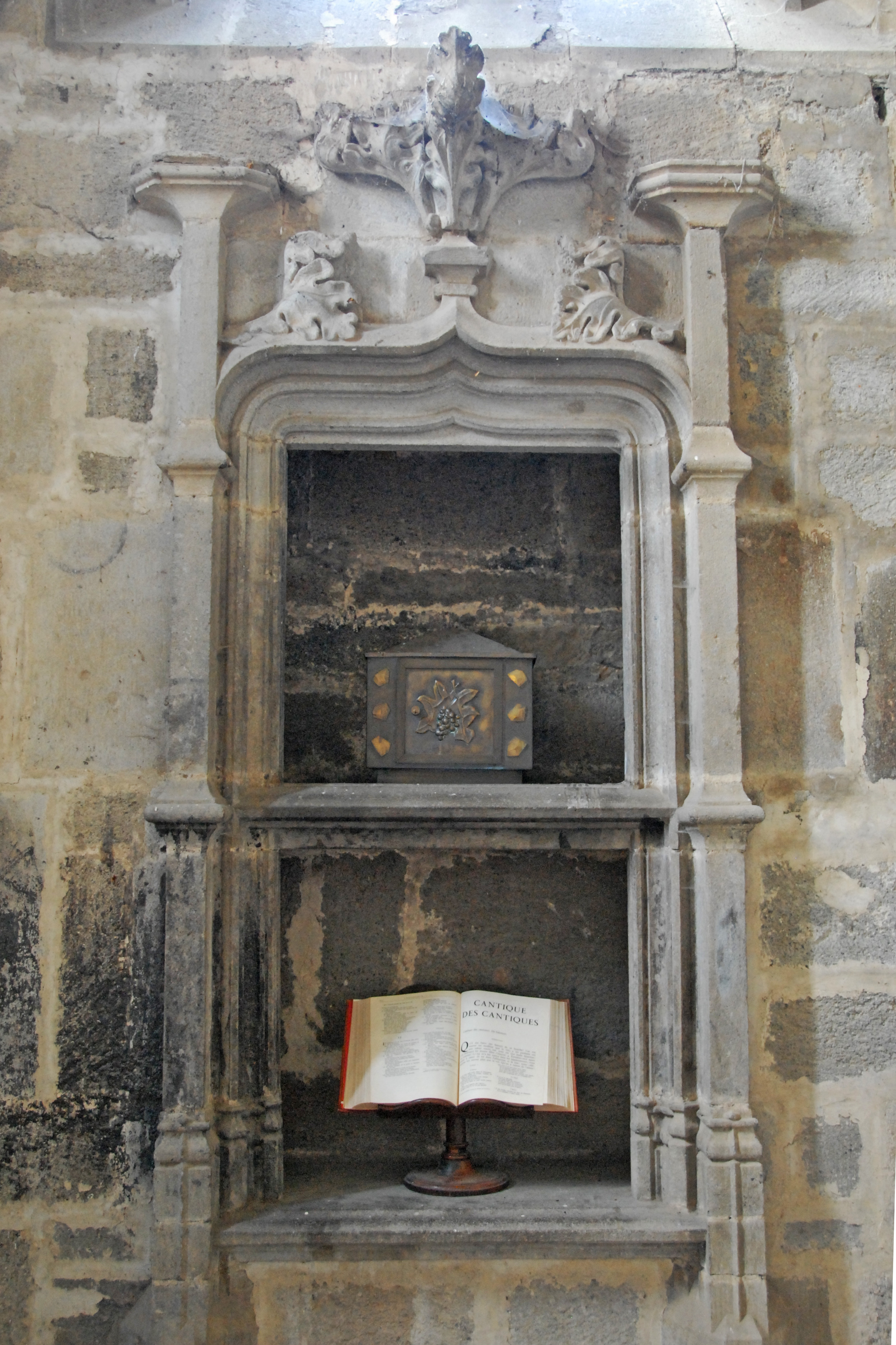 Chanteuges, Chapelle Ste.-Anne, Ausstellungsnischen